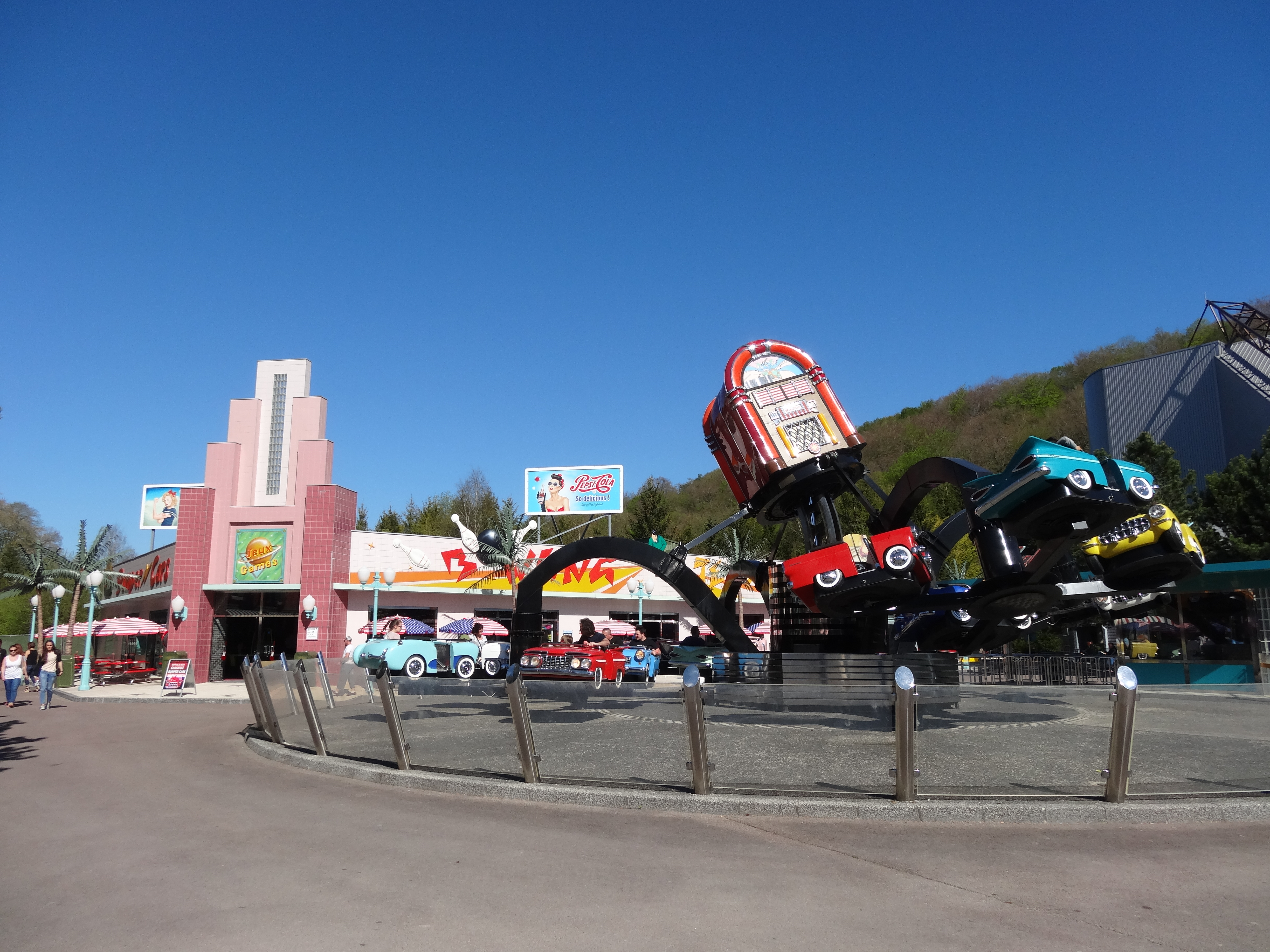 Hollywood Blvd et l'attraction Juke Box dans le village rock'n'roll du parc Nigloland